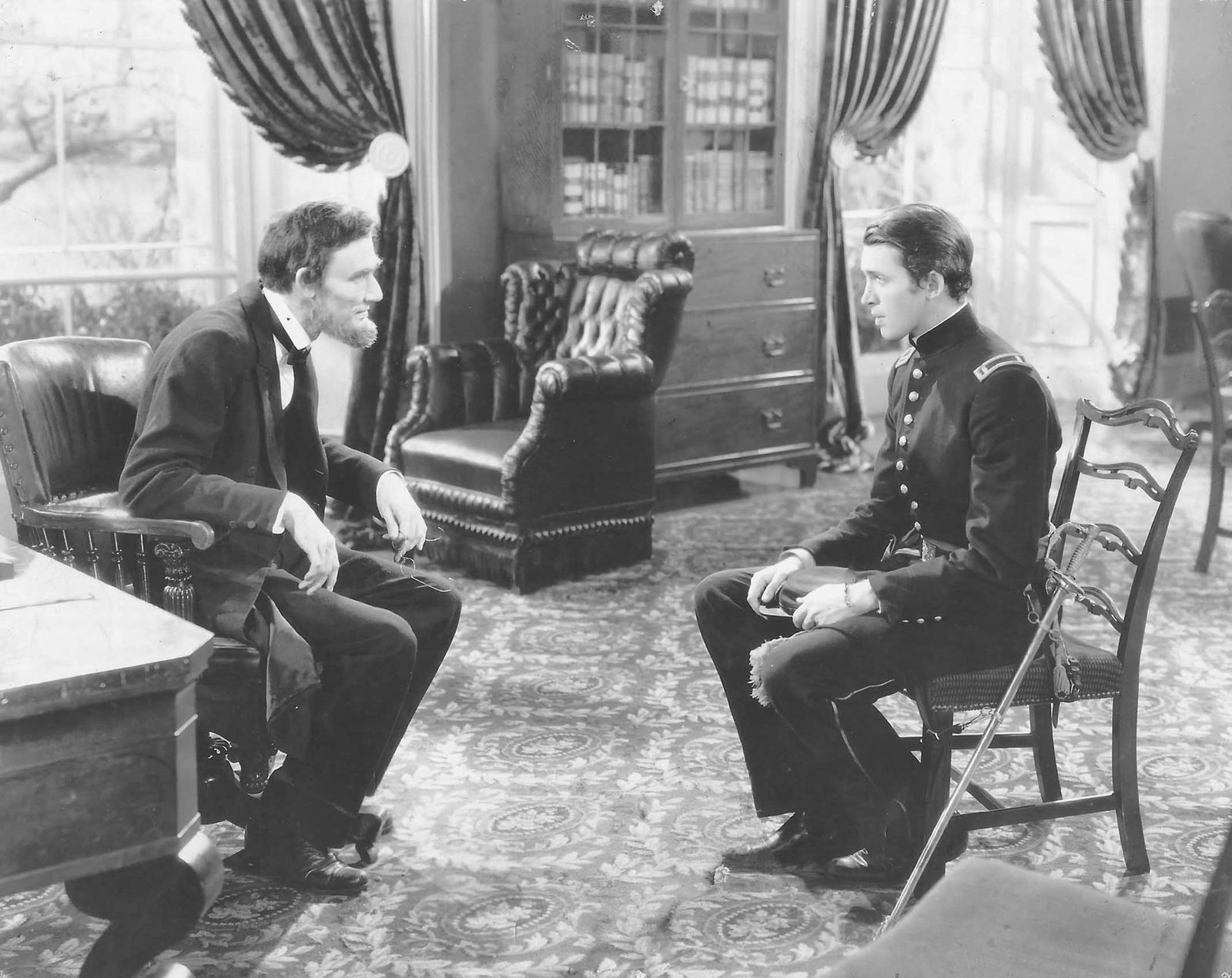 John Carradine & James Stewart in the American drama-western film Of Human Hearts 1938